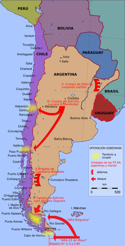 Diagrama de la Operación Soberanía en idioma español.